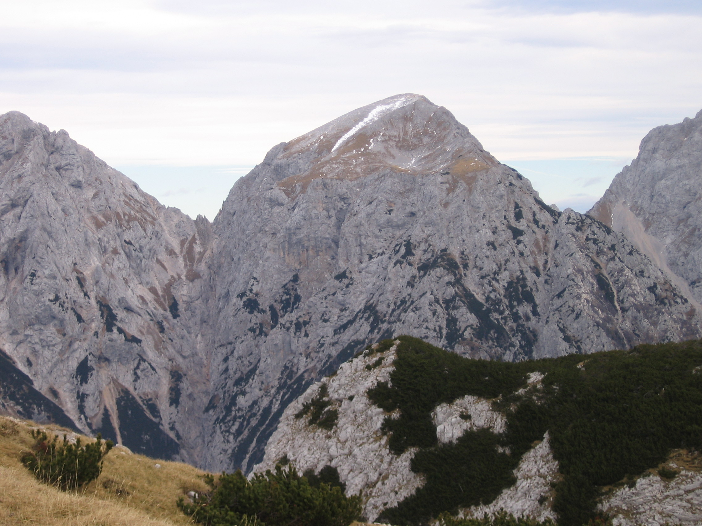 Mount Brana in Kamnik Alps, from Kalški greben